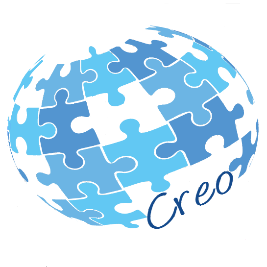 Estudiantes de la Universidad Santa María. C.R.E.O: compromiso, responsabilidad, excelencia y organización.